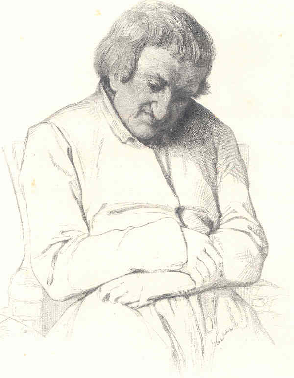 Joseph Varin es un jesuite français du debut du XIXe siècle.